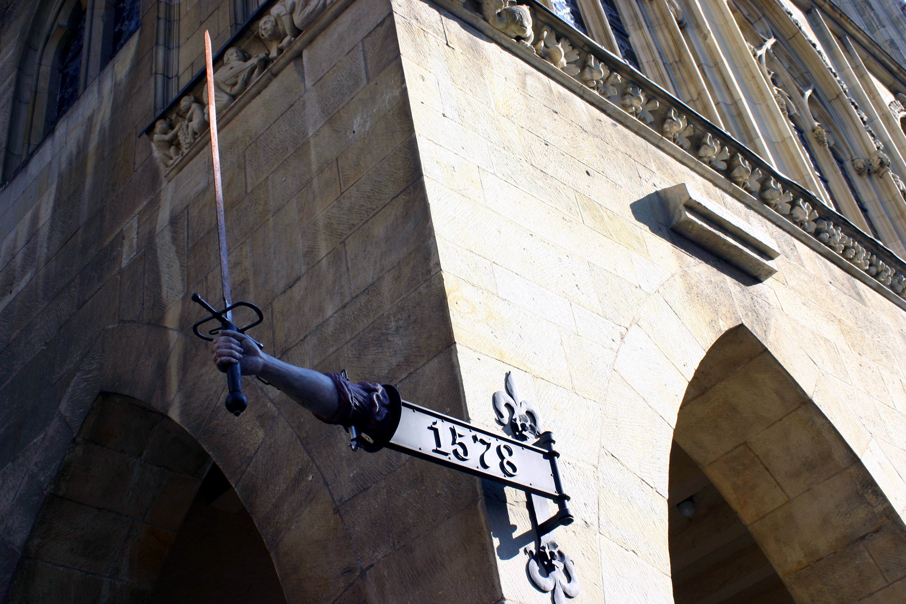 Münster, Aus Anlass des "Frühjahrssends" ist das Sendschwert an Münster historischem Rathaus angebracht